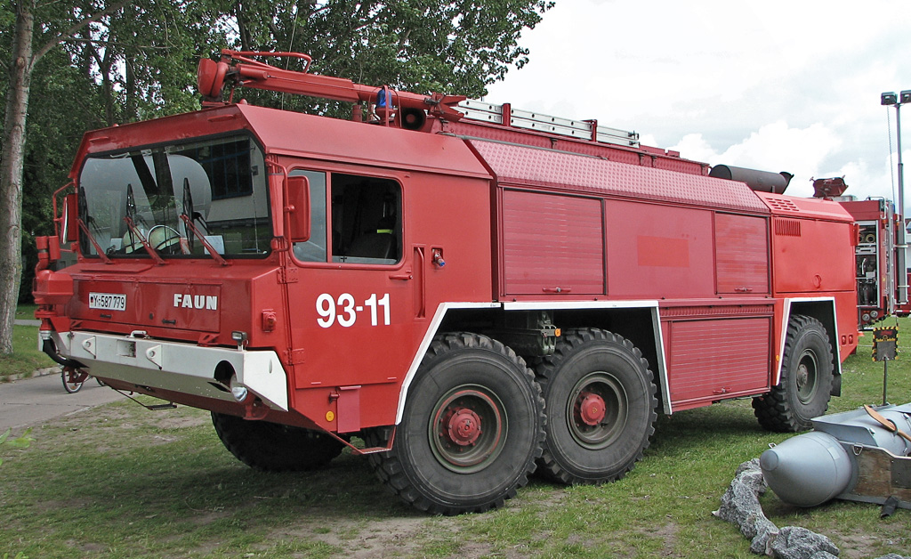 Beschreibung: Bundeswehr-Feuerwehr-Großtanklöschfahrzeug Faun GTLF 3500 Fotograf: Darkone, 13. August 2005